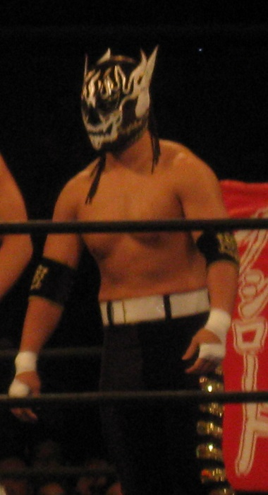 2014年3月23日 ベイコム総合体育館 「NEW JAPAN CUP Final」 エル・デスペラード